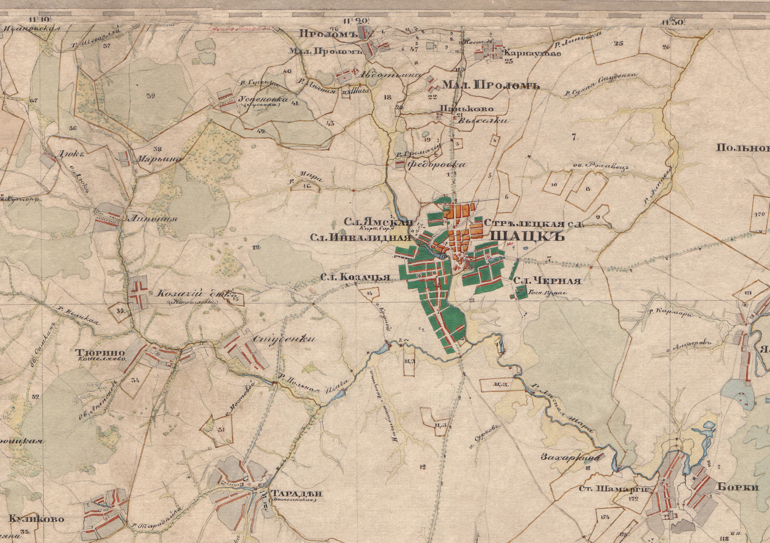 Карта Шацкого уезда в 1862 году. Автор не известен.